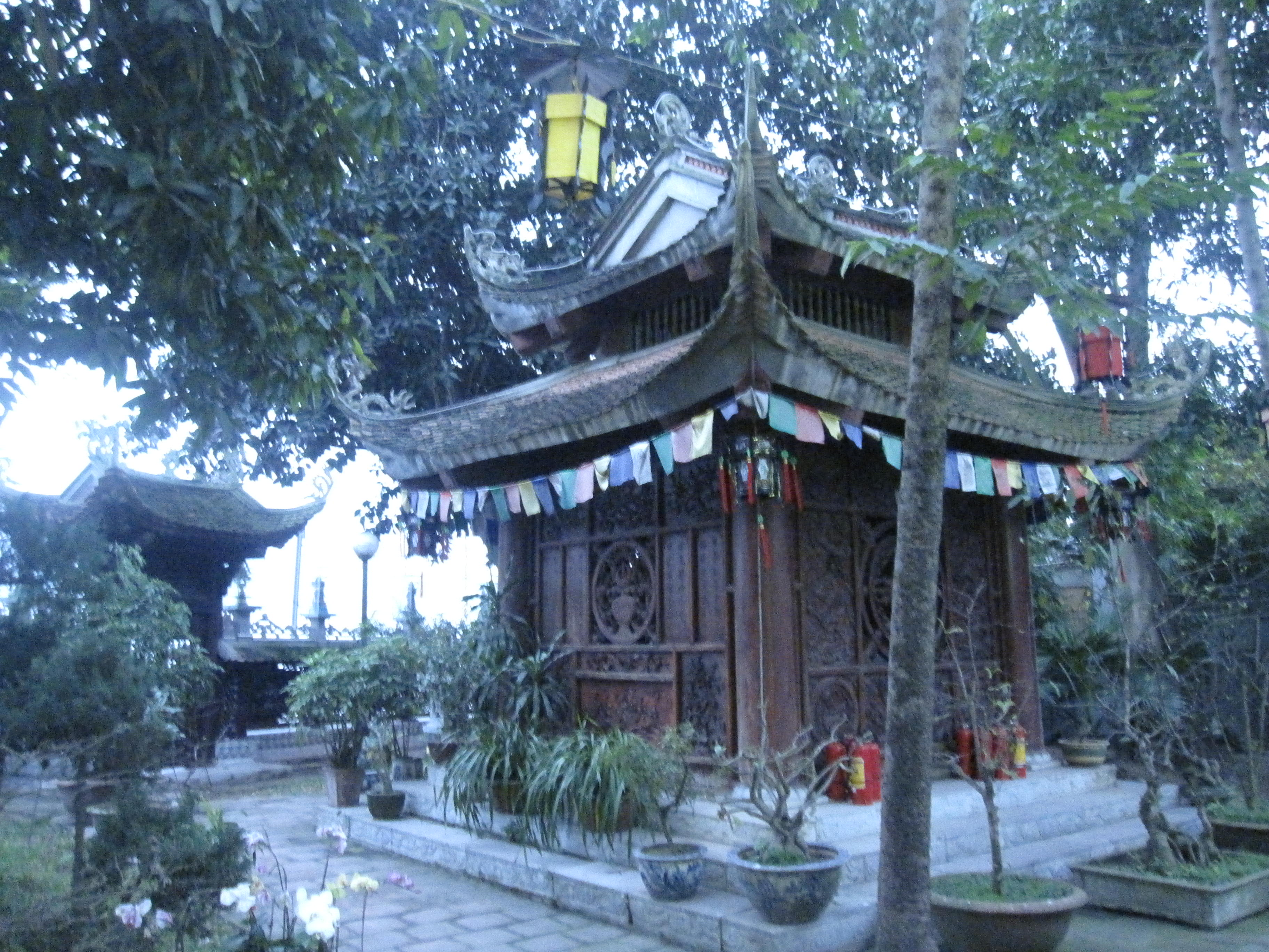 Lầu Quan Âm trong chùa Vạn Niên, phường Xuân La, quận Tây Hồ, Hà Nội, Việt Nam